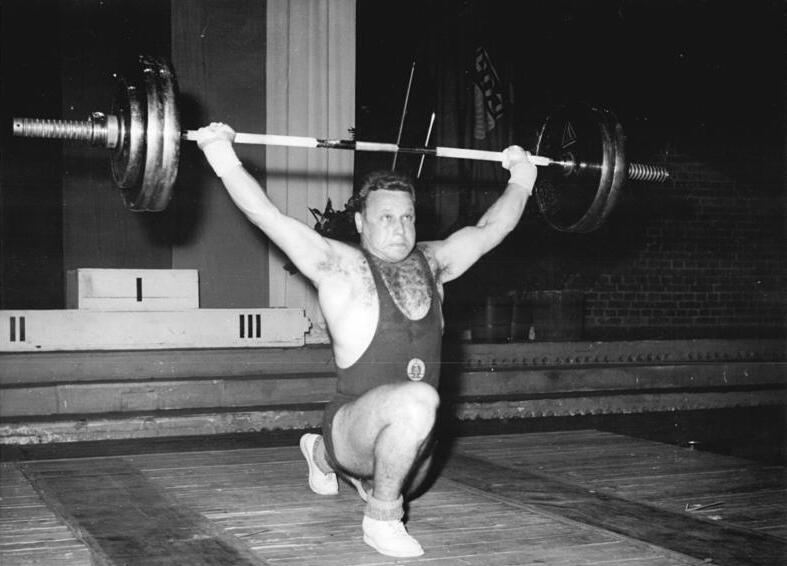 Dieter Göhring Zentralbild Studré 18.06.1961 Deutsche Meisterschaften im Gewichtheben wurden am 17.06. und 18.06.1961 im Berliner Klubhaus der Jugend und Sportler durchgeführt. UBz: Neuen Deutschen Rekord stellte Dieter Göhring (ASK Vorwärts Leipzig) im Mittelschwergewicht mit 162,5 kg im Stoßen auf. Damit wurde Göhring wieder Deutscher Meister.